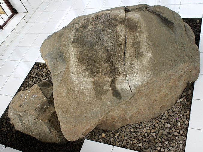 Prasasti Plumpungan berada di Dukuh Plumpungan, Desa Kauman Kidul, Kecamatan Sidorejo. Prasasti ini dipercaya sebagai asal mula Kota Salatiga.